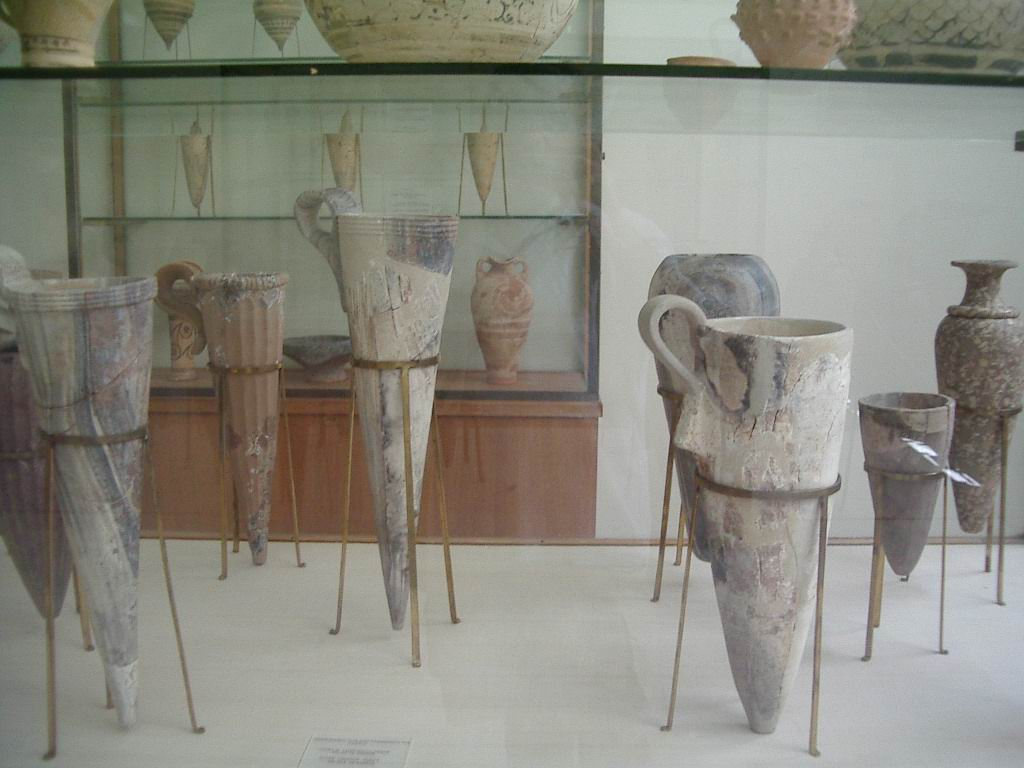 Museu arqueològic de Creta a Heràkleion, foto feta per J. Ollé el 6 d'agost del 2005.